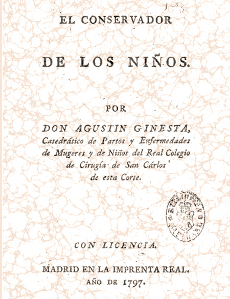 Andres ginesta